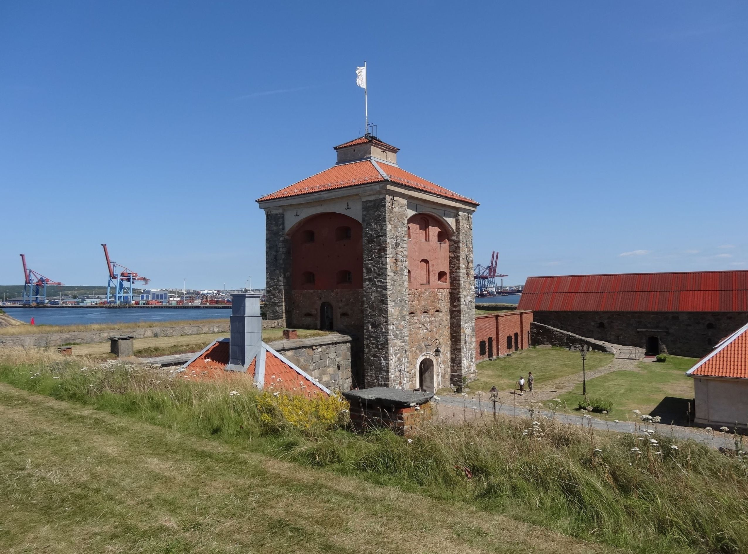 Nya Älvsborg erbjuder en kulturhistorisk oas mitt inne i Göteborgs hamn. Vy från kurtin 9 mot nordost.